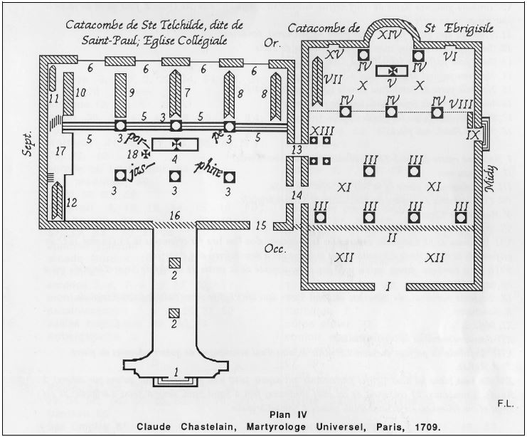 Plan des cryptes d'après Claude Chastelain (Martyrologe universel, 1709)